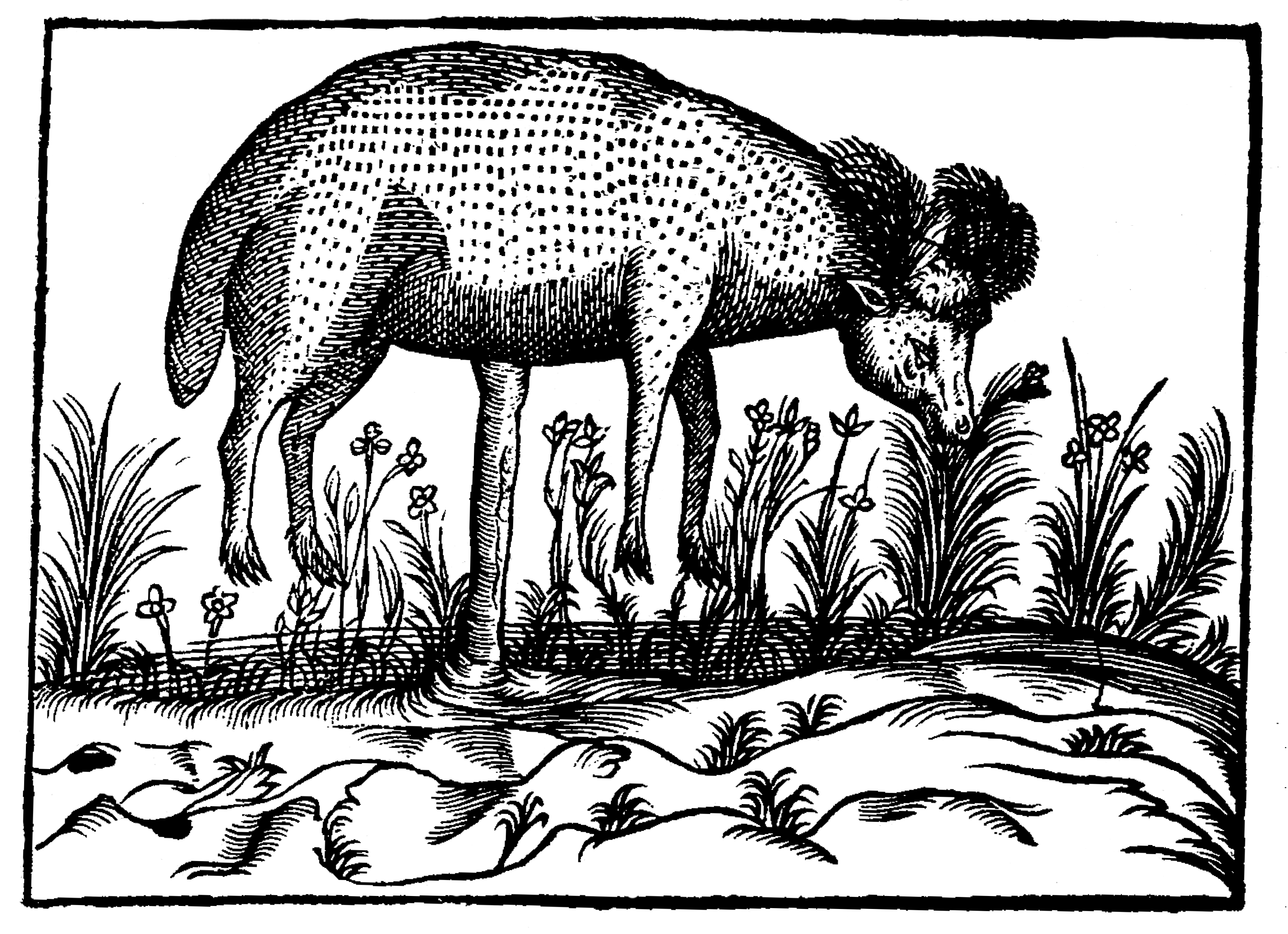 Portraict du Boramets de Scythie ou Tartarie, p. 330